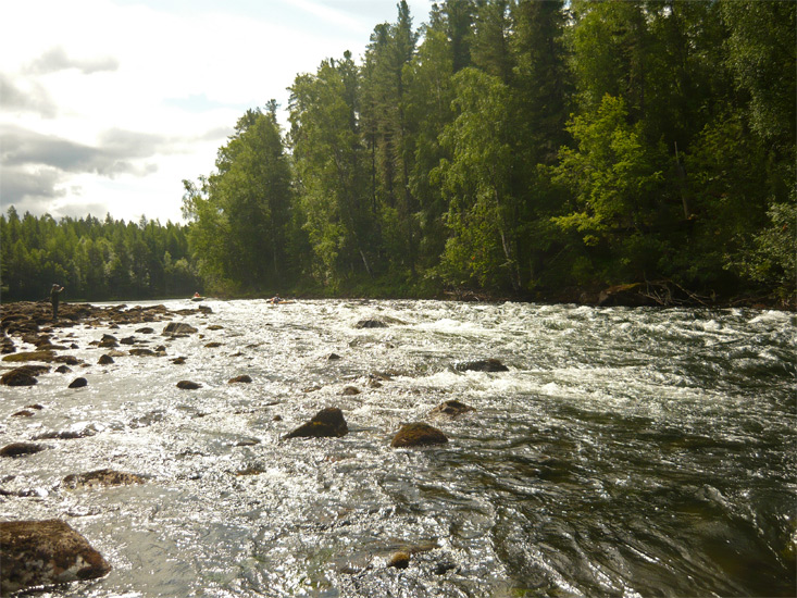 Река Фролиха (Нерунда)